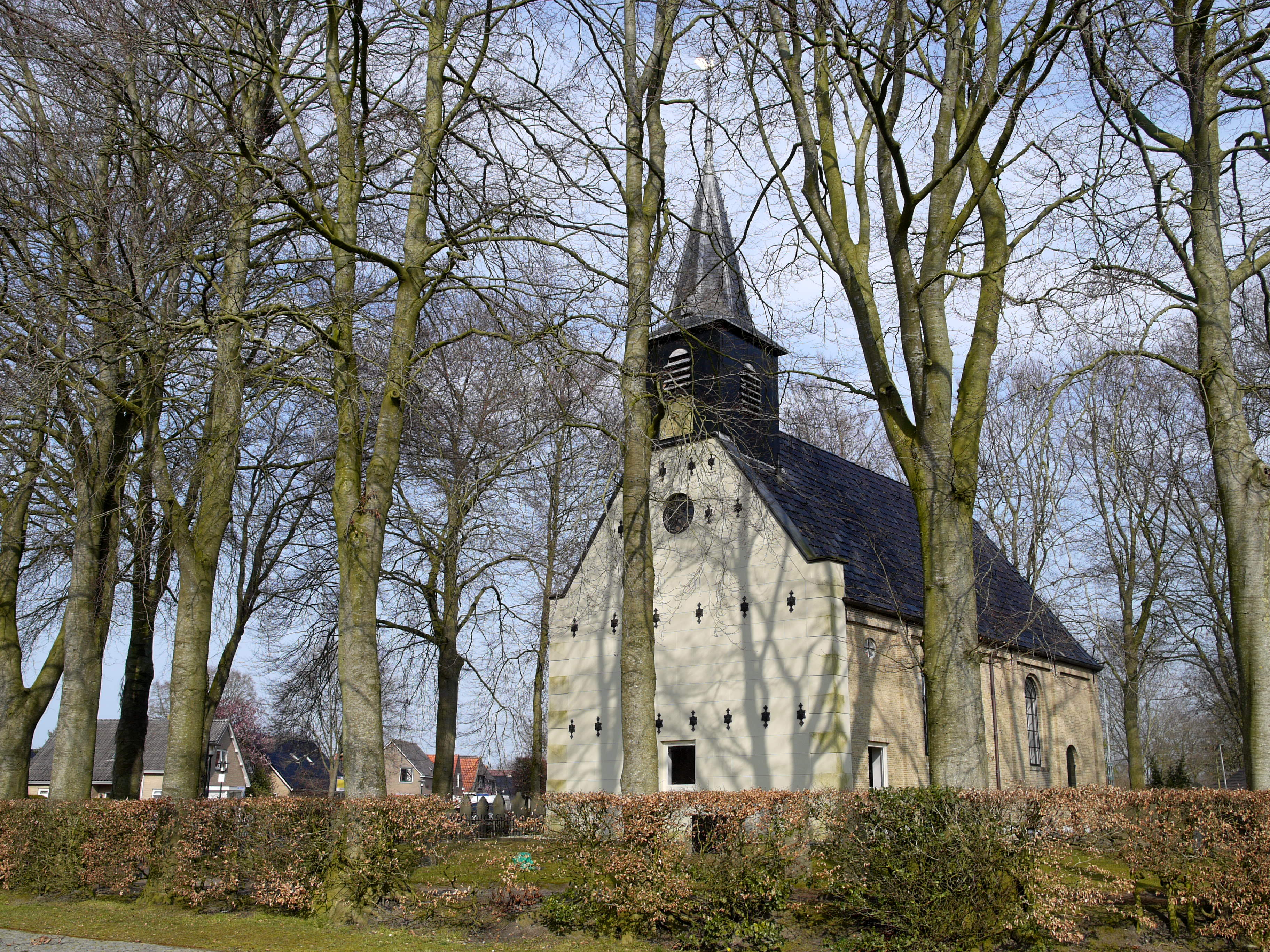 Het witte kerje van Nijehorne